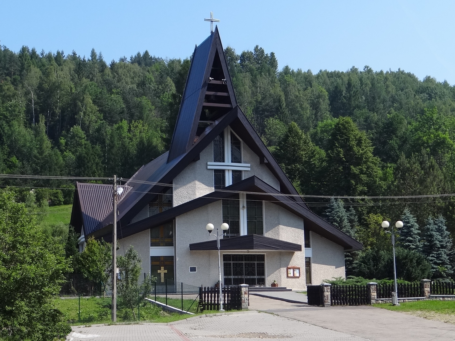 Kościół w Przyborowie